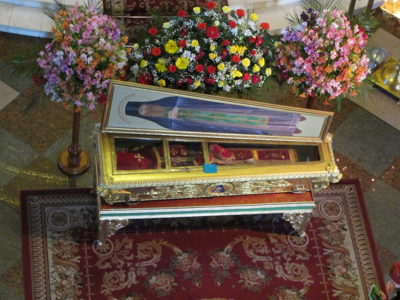 Мощі Преподобного Меркурія у Михайлівському Монастирі